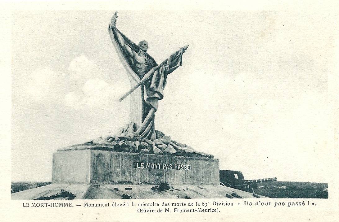 Verdun (Meuse) & environs - Guerre 1914-1918 : Le Mort-Homme : Monument élevé à la mémoire des soldats de la 69e division (Oeuvre de M. Froment-Meurice; 1922) - vers 1930